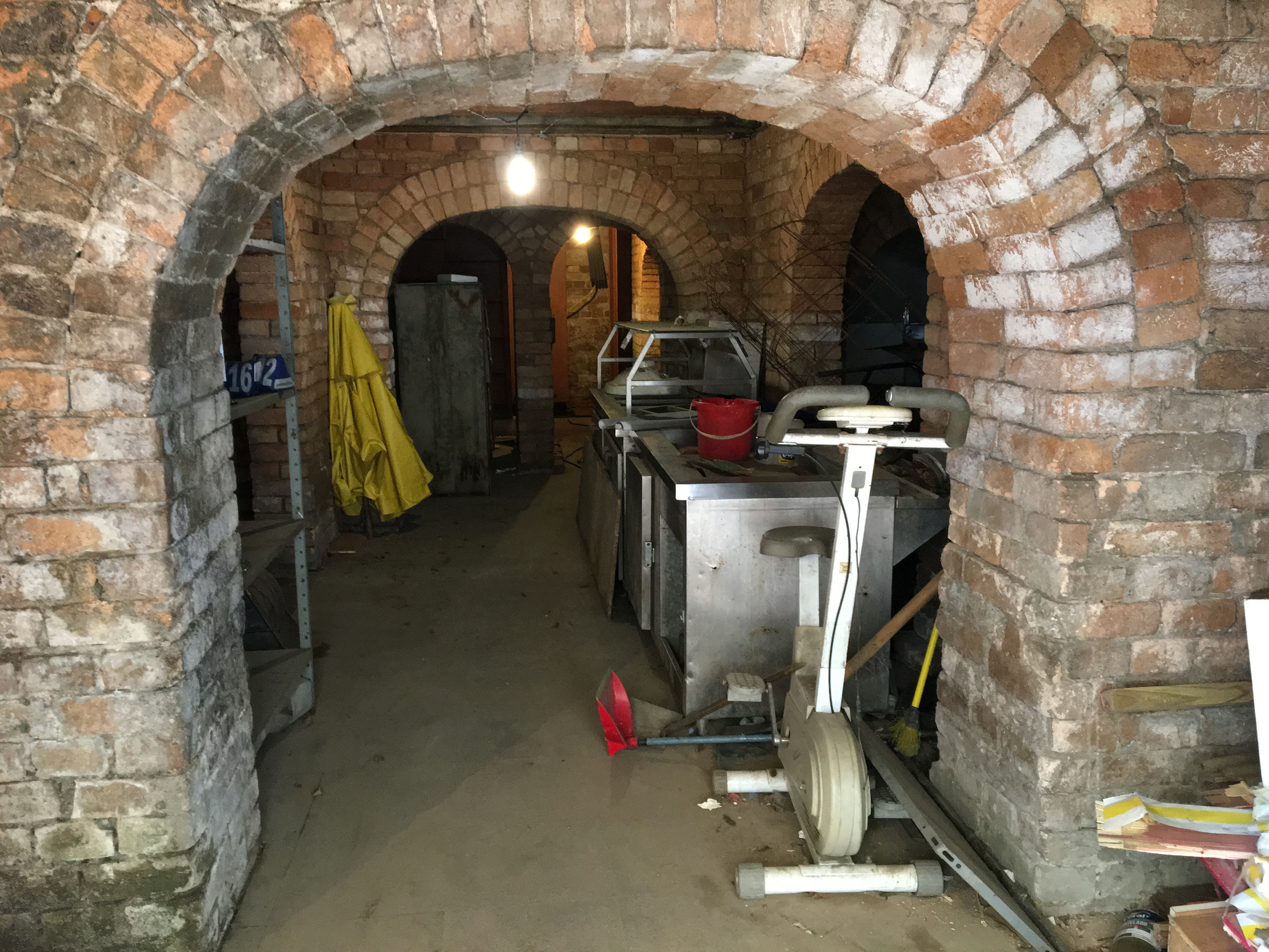 Antiga senzala do Casarão Marieta Teixeira de Carvalho, em São Paulo (SP), Brasil. Hoje é almoxarifado do Mosteiro de São Bento.